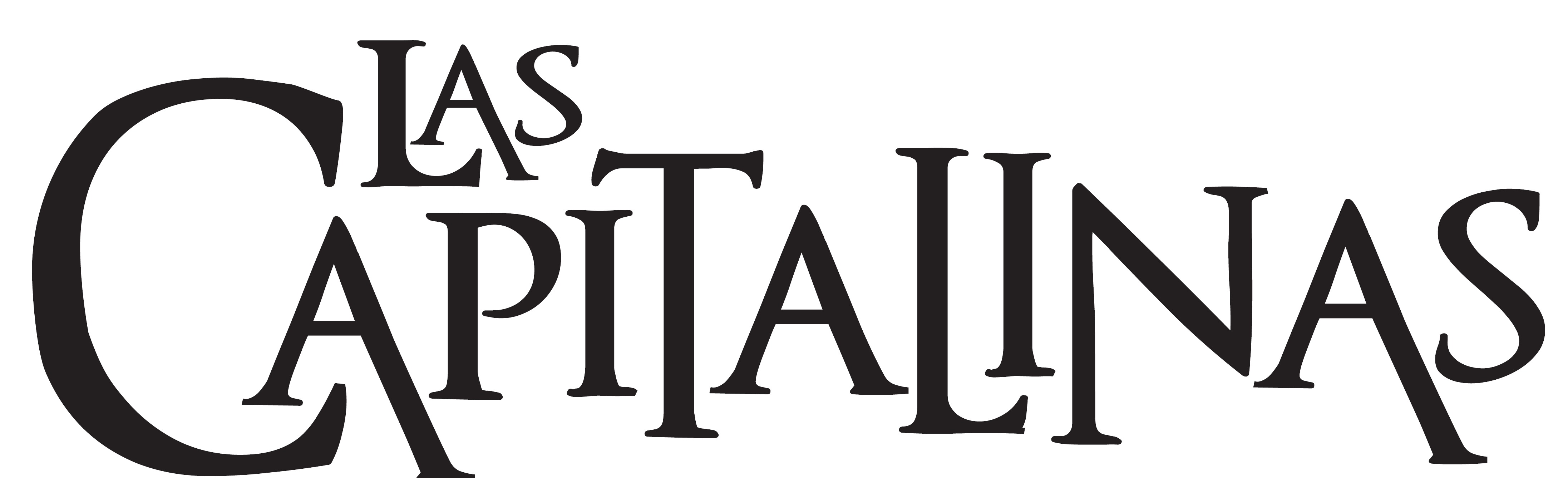 Logo Las Capitalinas